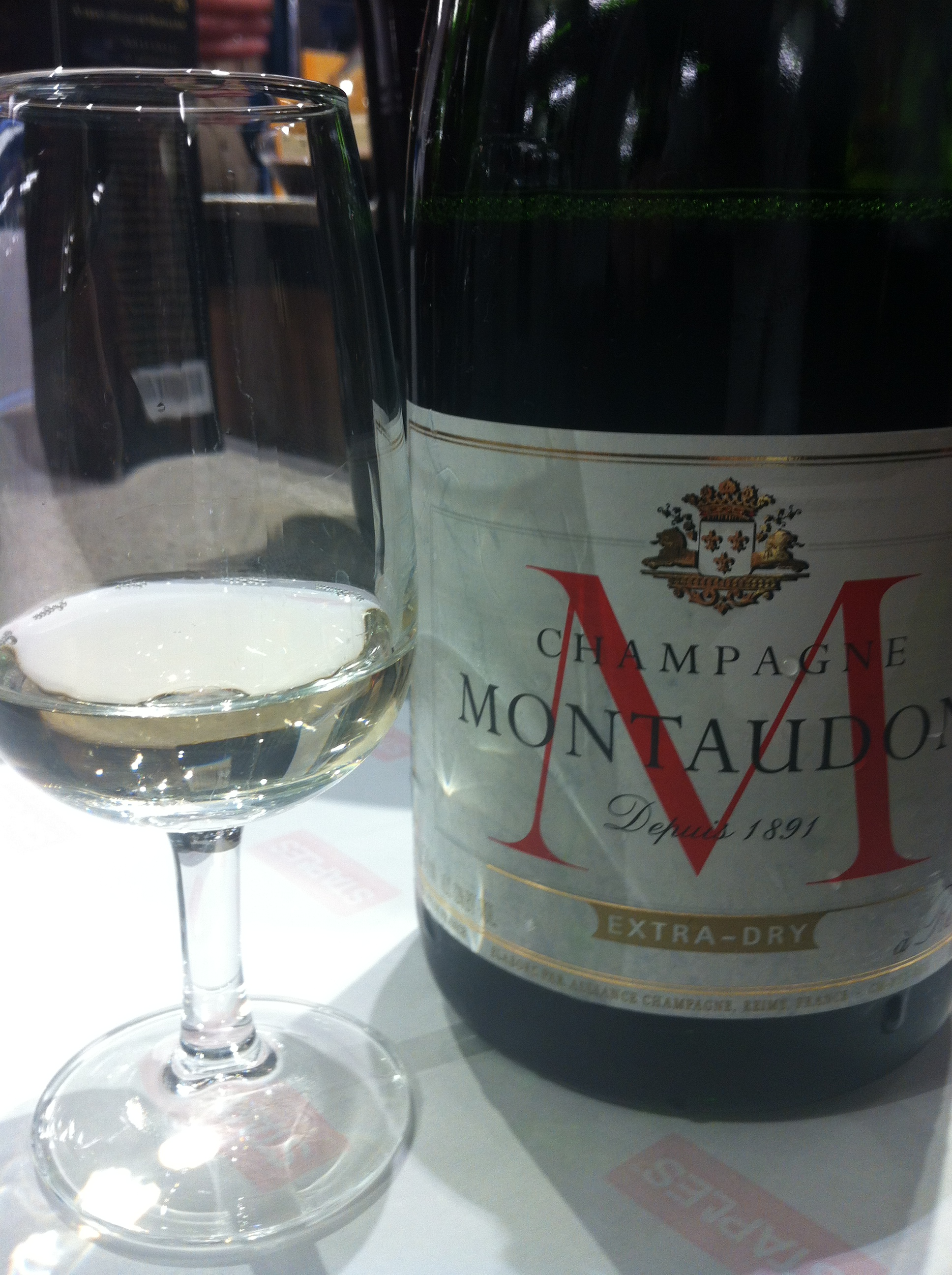 French champagne